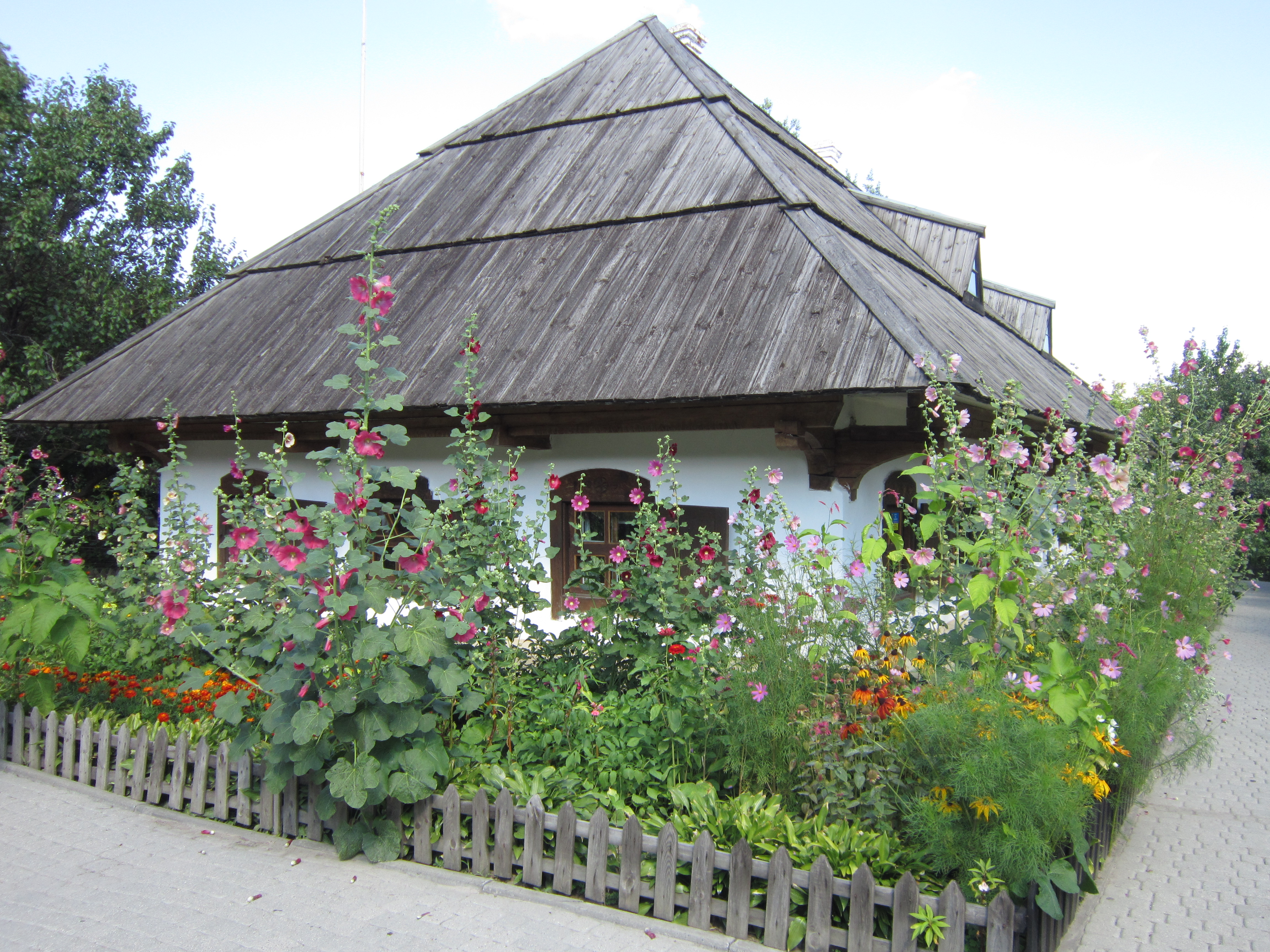 Меморіальний комплекс – садиба письменника І. П. Котляревського (комплекс), Полтава, Соборний майдан, 3